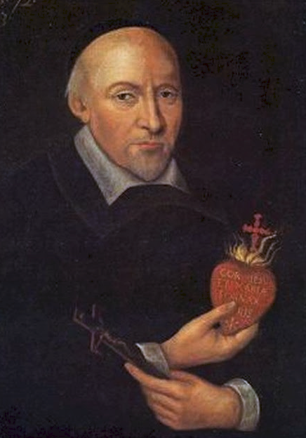 Portret van Jean Eudes.